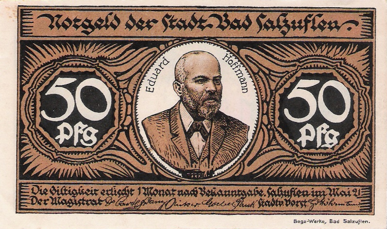 Notgeld Bad Salzuflen